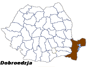 Dobroedjza (Dobrogea).